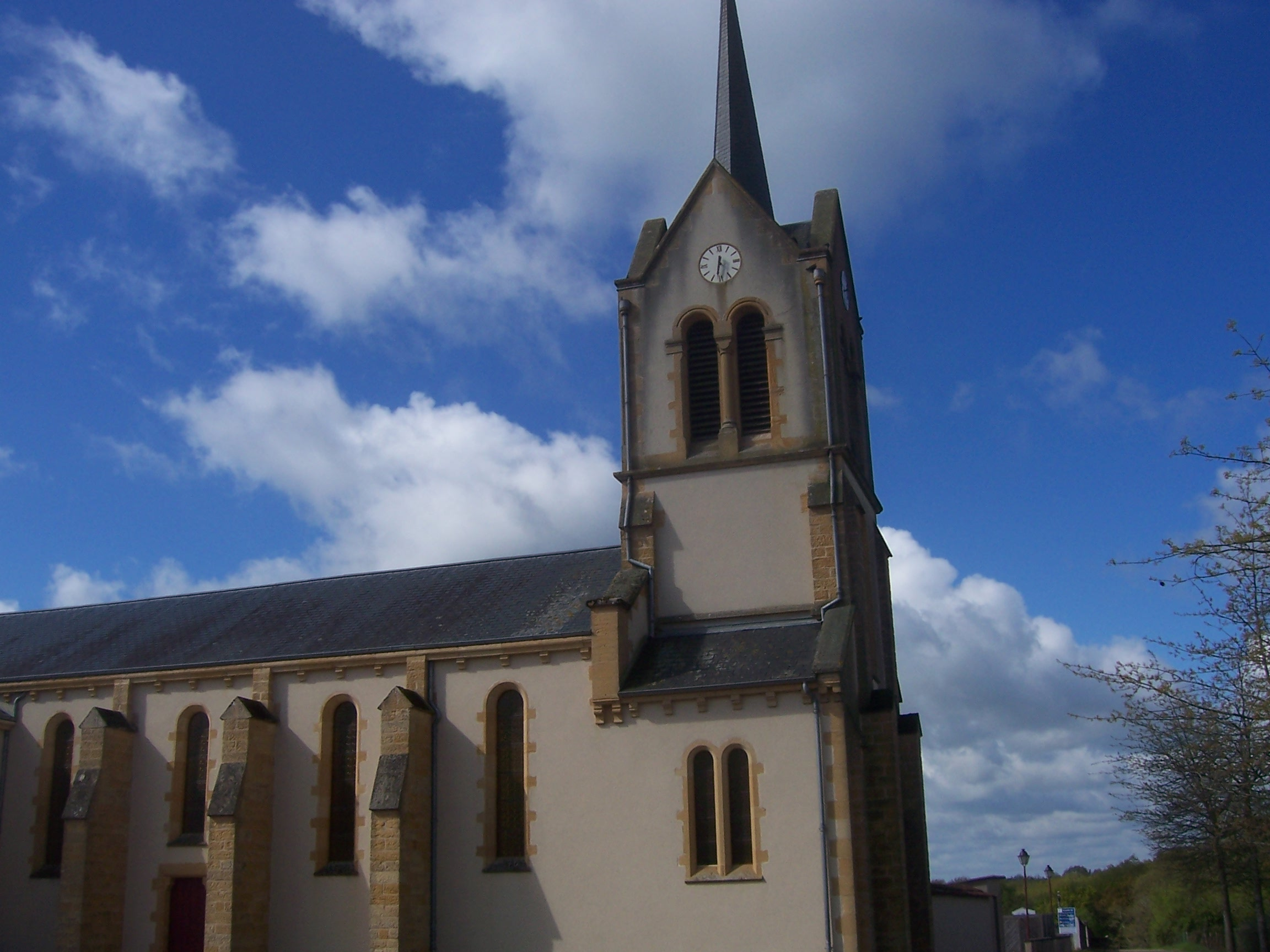 Eglise des Guerreaux